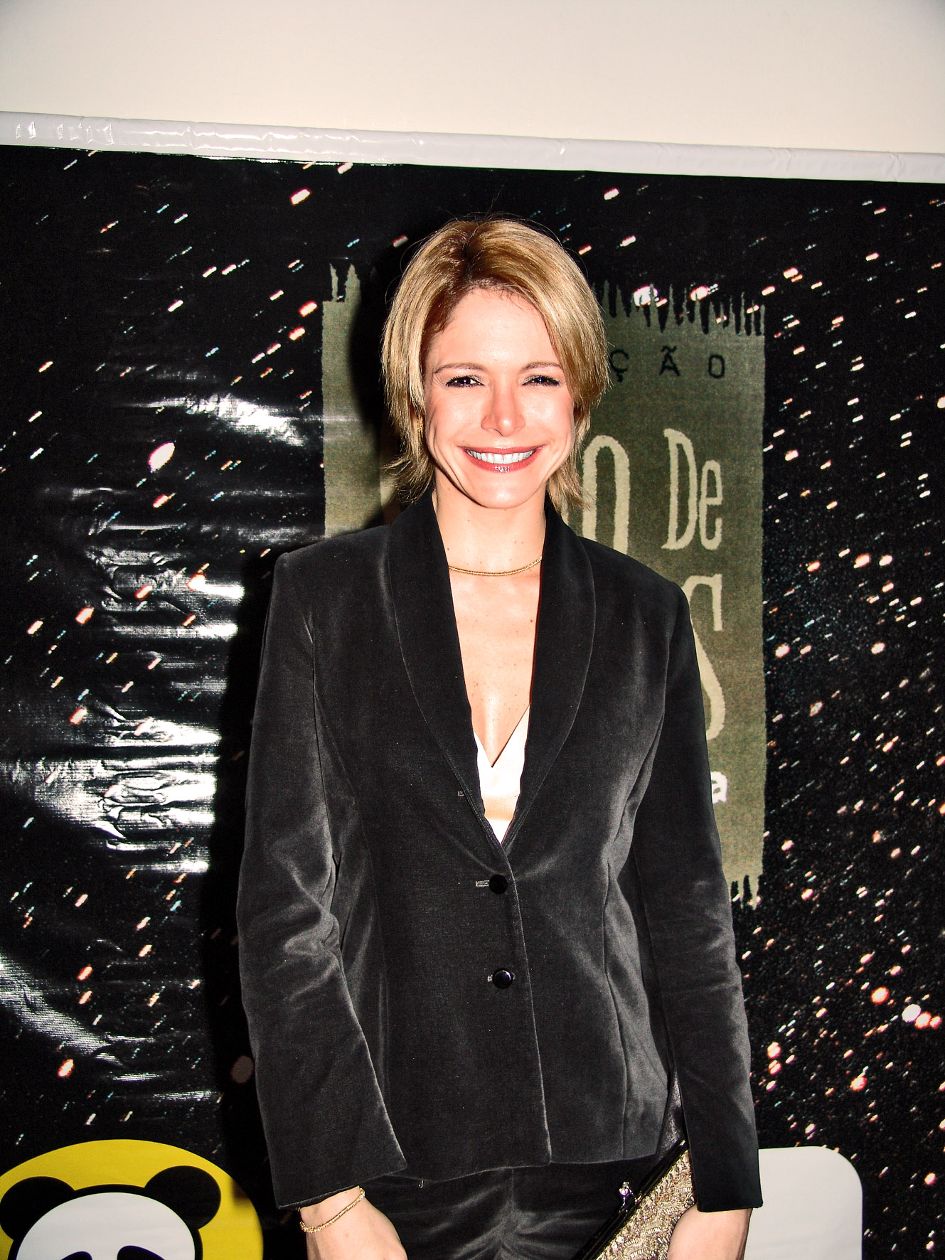 A apresentadora de televisão Babi Xavier.